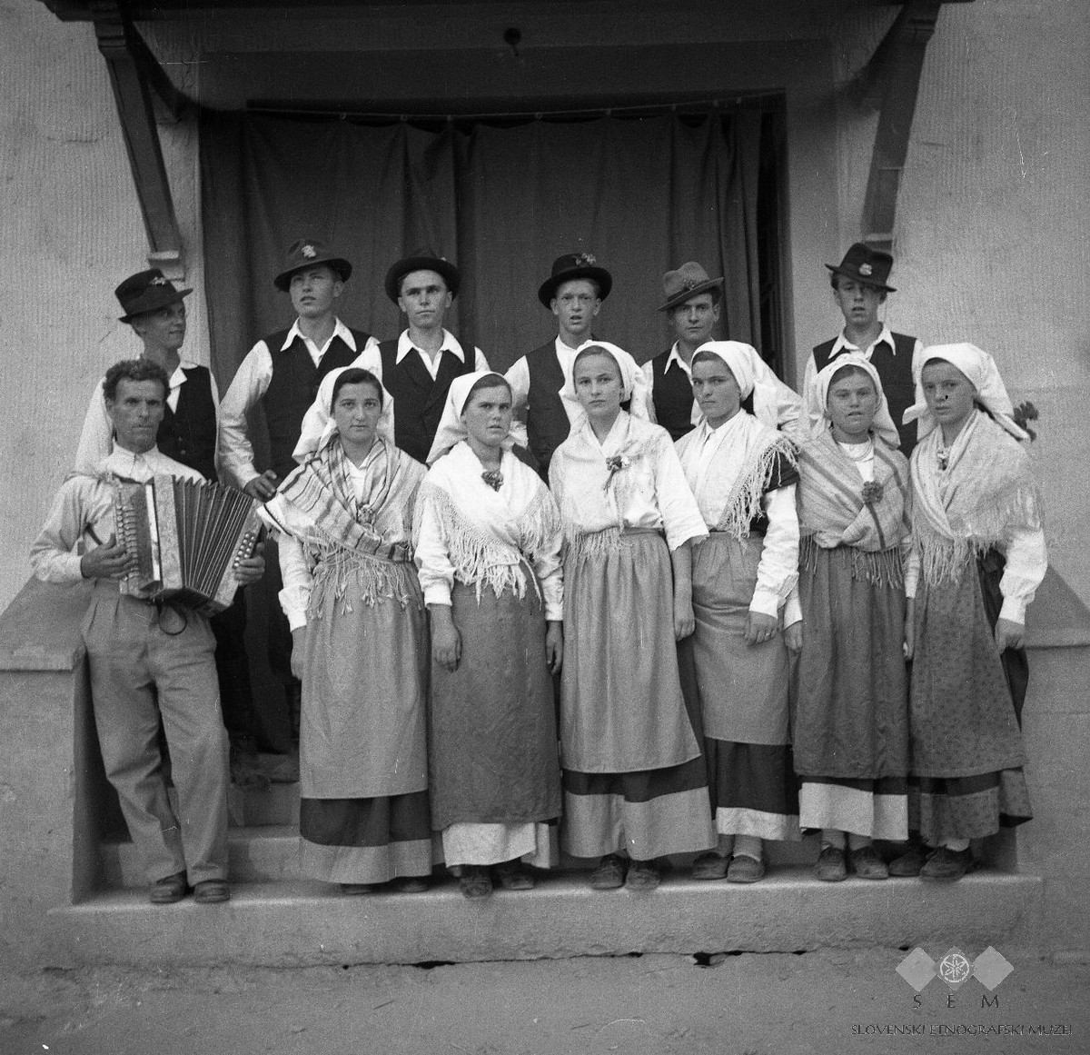 Skupina plesalk in plesalcev po generalni vaji, Marezige.